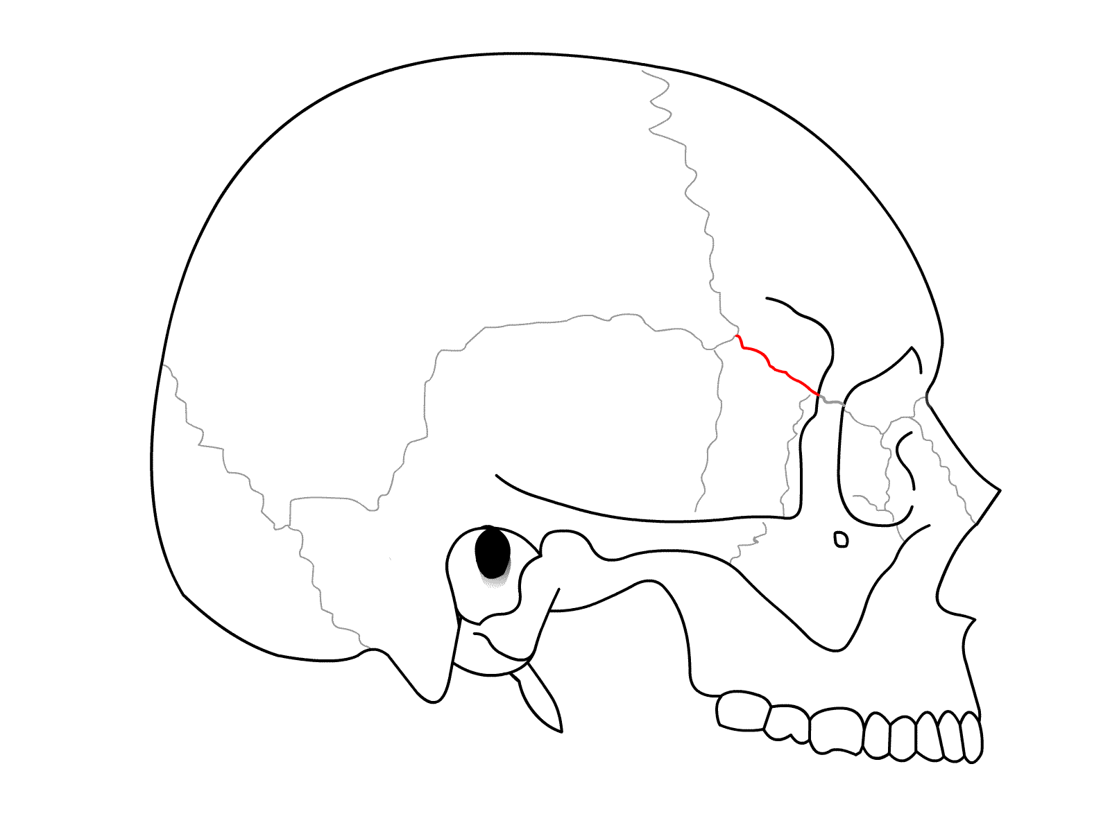 Schädel seitlich - Sutura